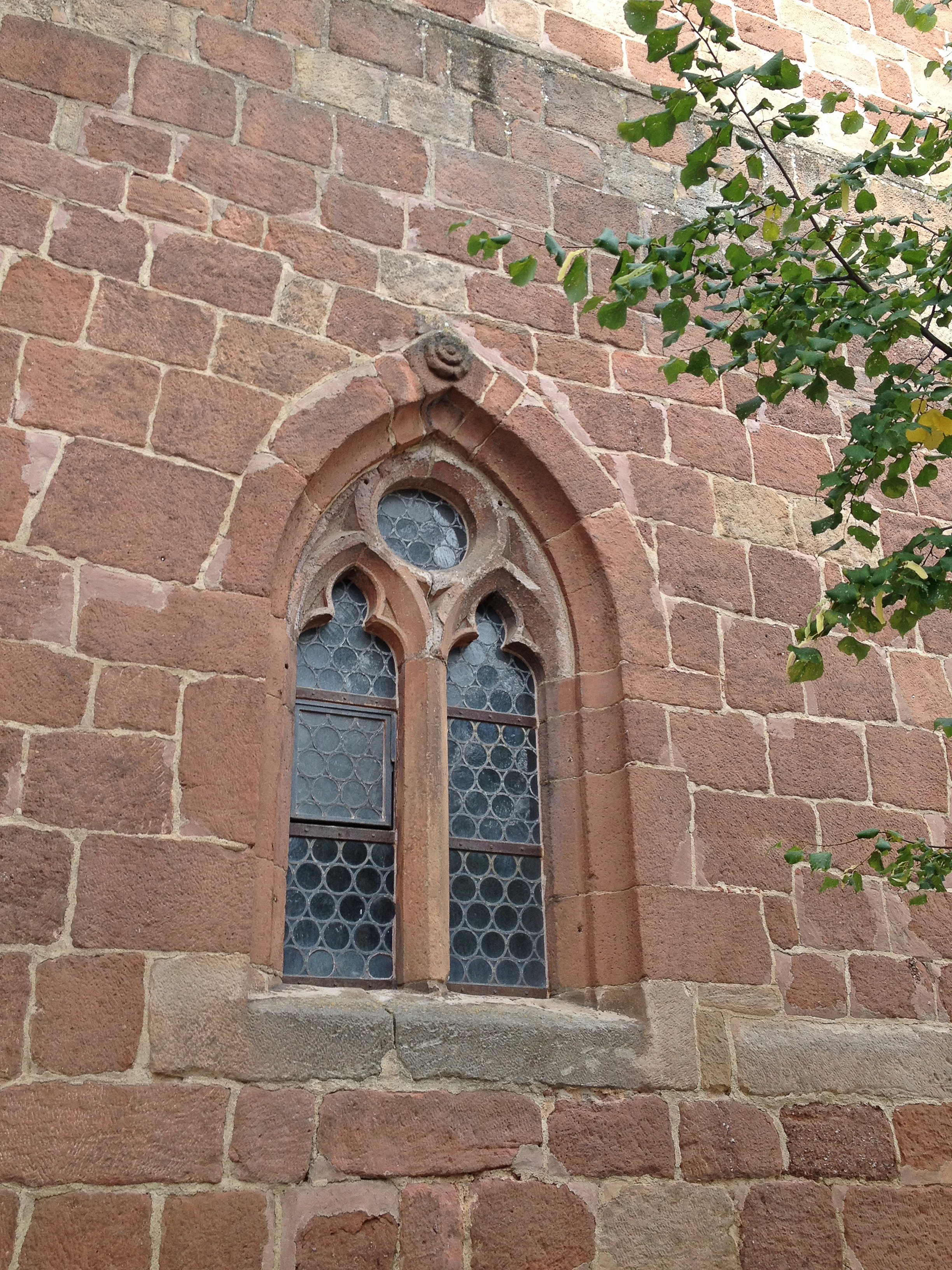 Wappenrose des Kloster Rosenthals über dem gotischen Chorfenster im Turmuntergeschoß der protestantischen Kirche in Göllheim.